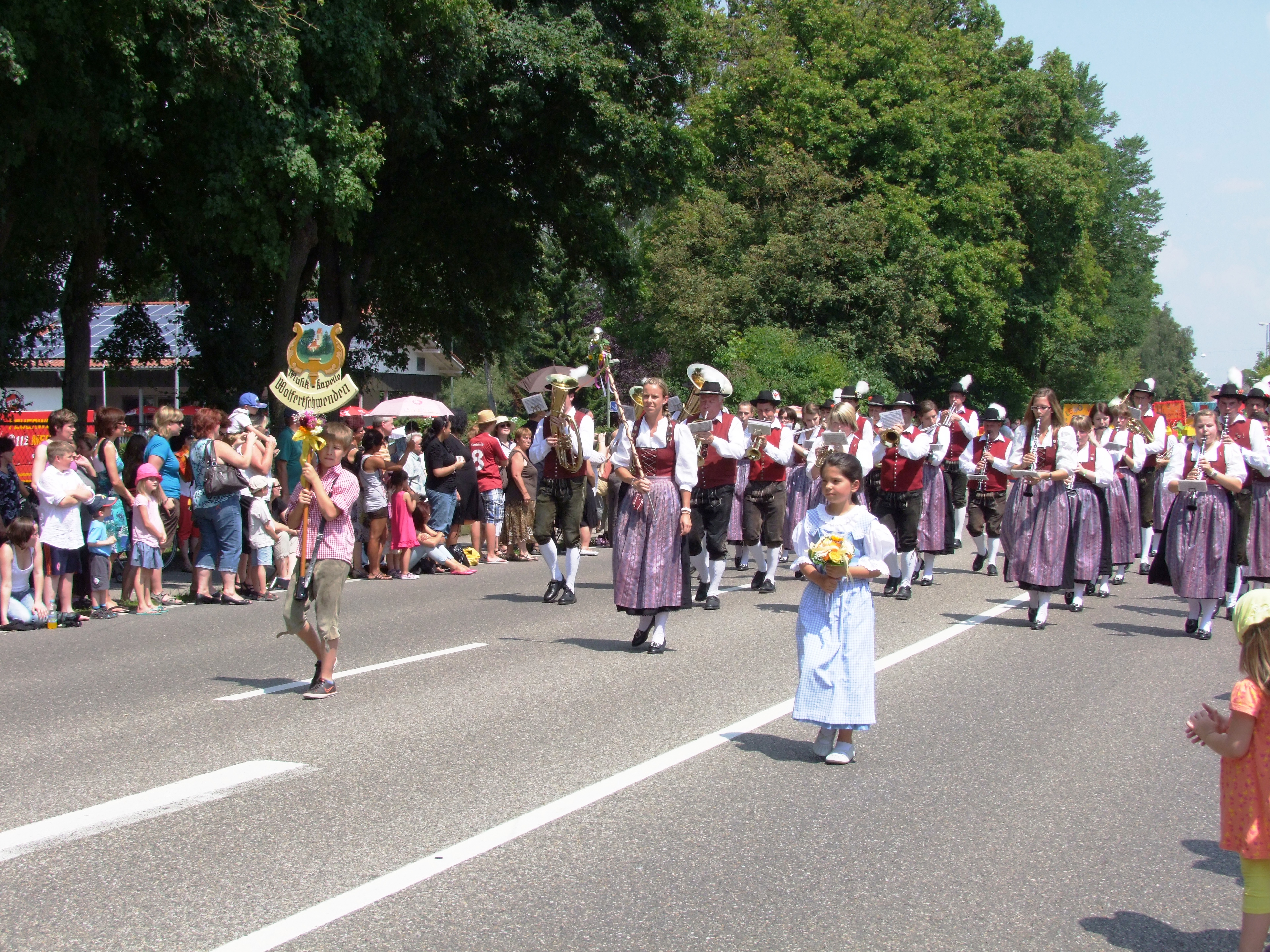 Das Memminger Kinderfest 2012